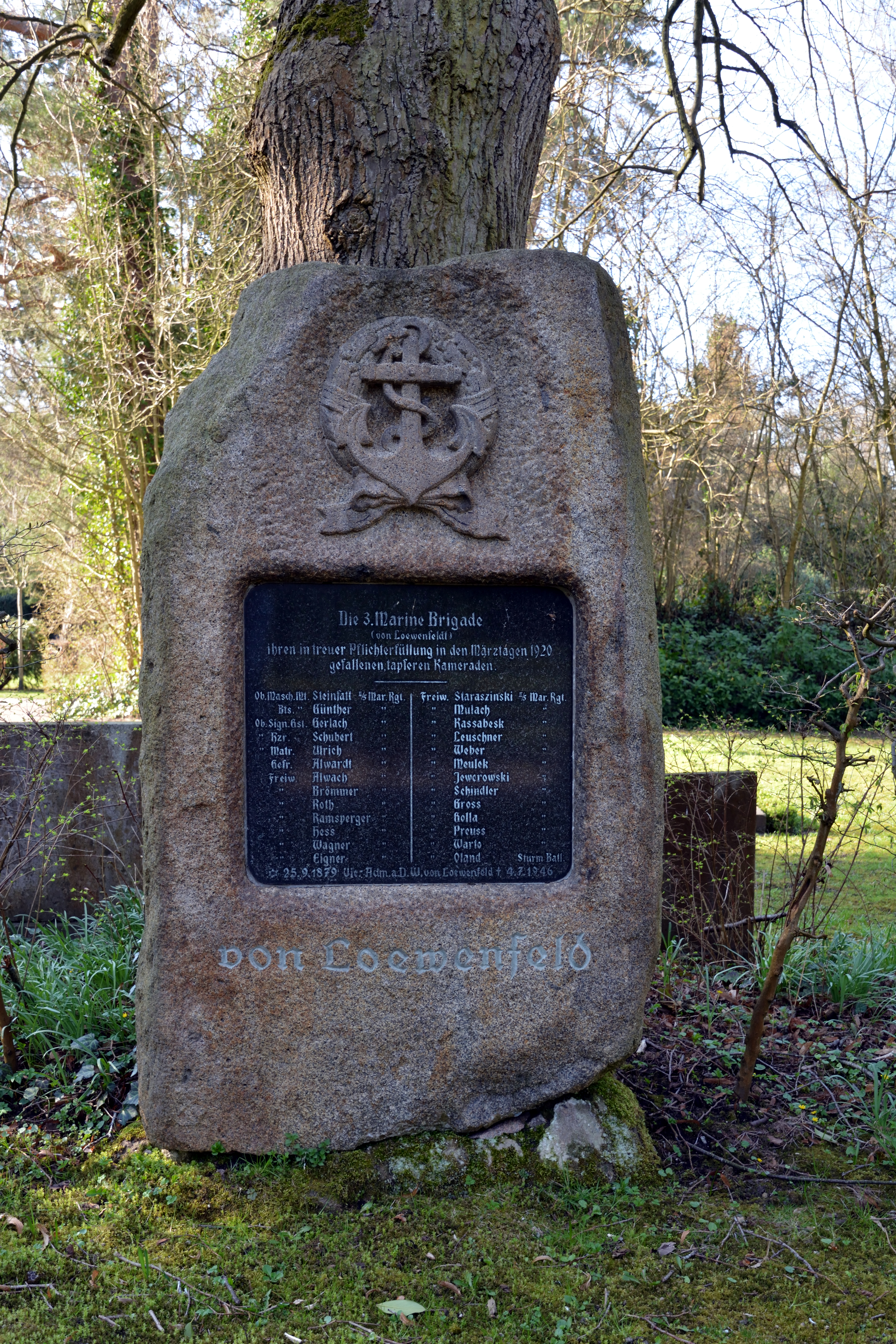 Impressionen vom Nordfriedhof in Kiel: Ehrengrab von Wilfried von Loewenfeld